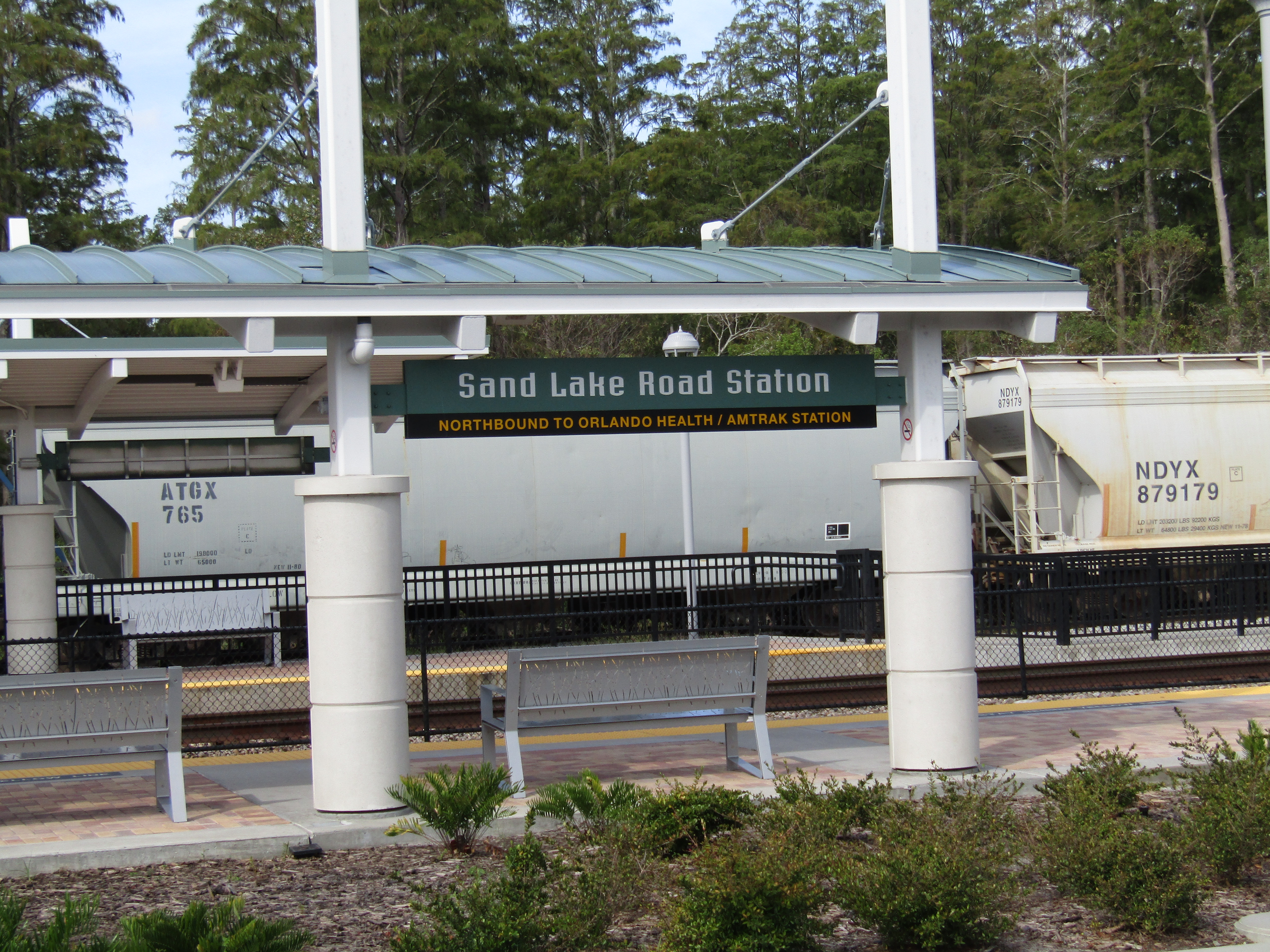 Sand Lake Station in Orange County, Florida